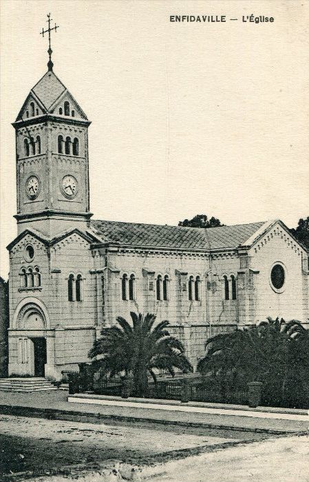 Ancienne église d'Enfidaville maintenant convertie en musée d'archéologie